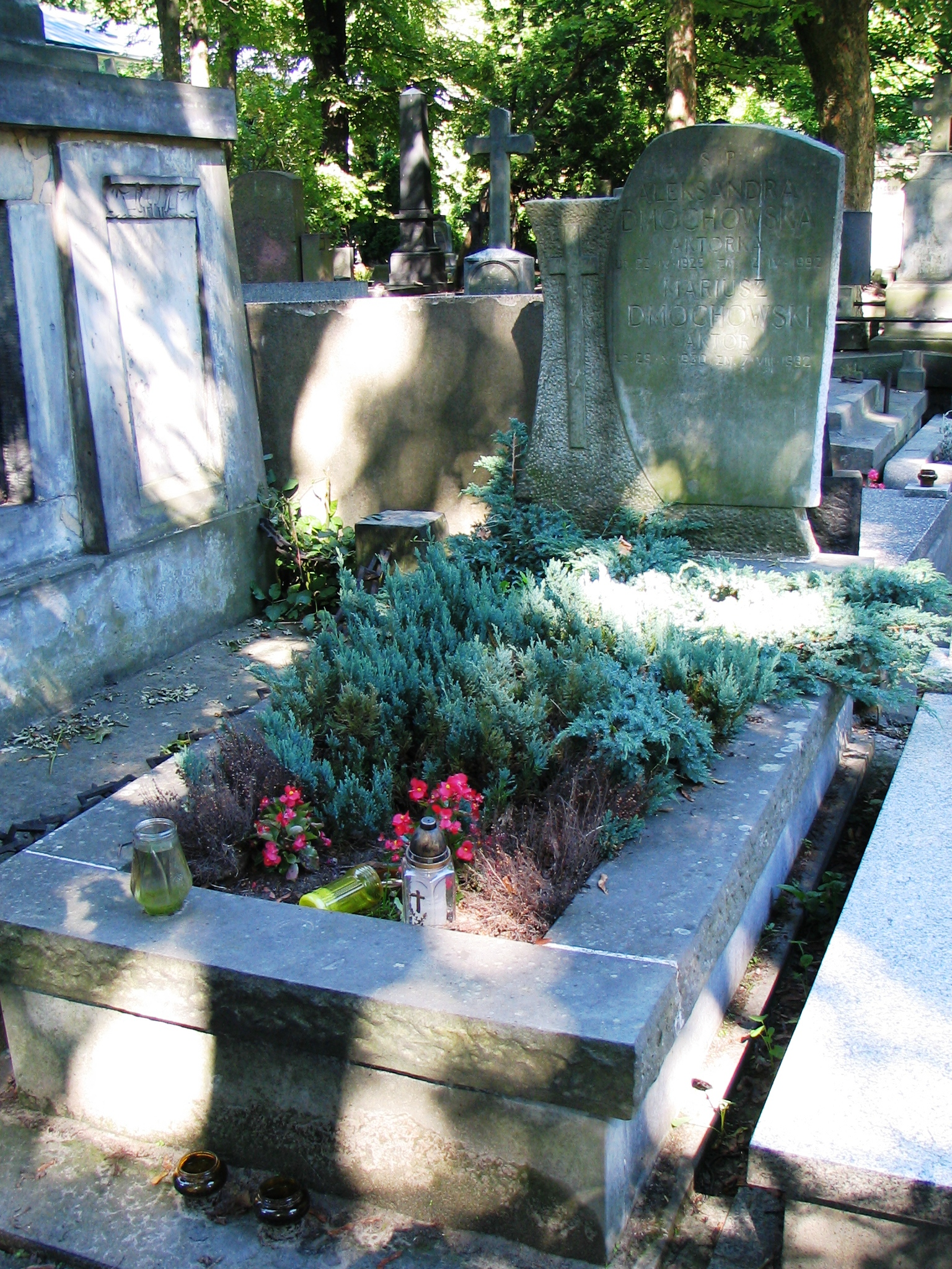 Grób aktora Mariusza Dmochowskiego i jego żony Aleksandry, również aktorki.